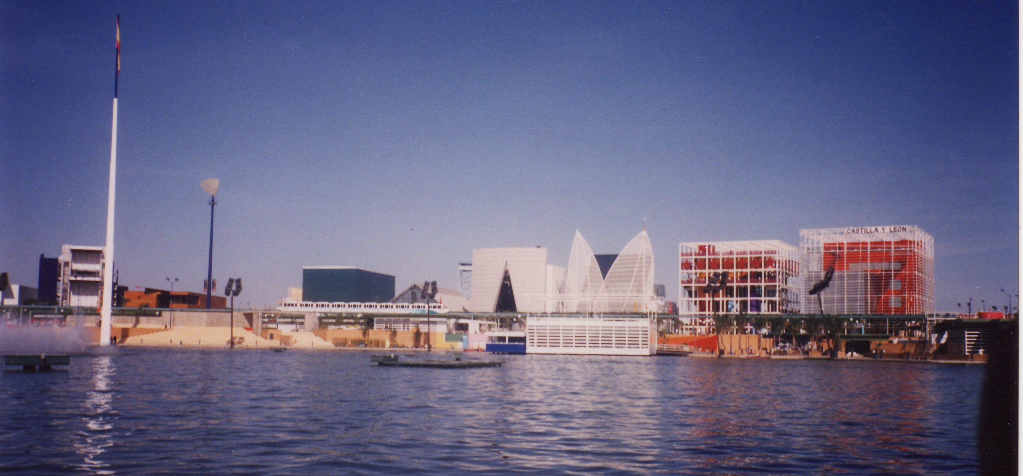 Exposición Universal Sevilla 92. Viaje en Abril; pabellones autonómicos al borde del Lago de España; de izquierda a derecha:Galicia, Murcia, Canarias, Navarra, Extremadura, Baleares, Madrid y Castilla y León